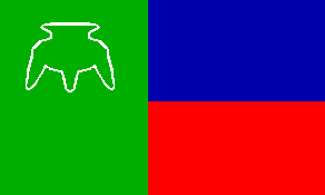 Bandera del municipio Jiménez, estado Lara, Venezuela